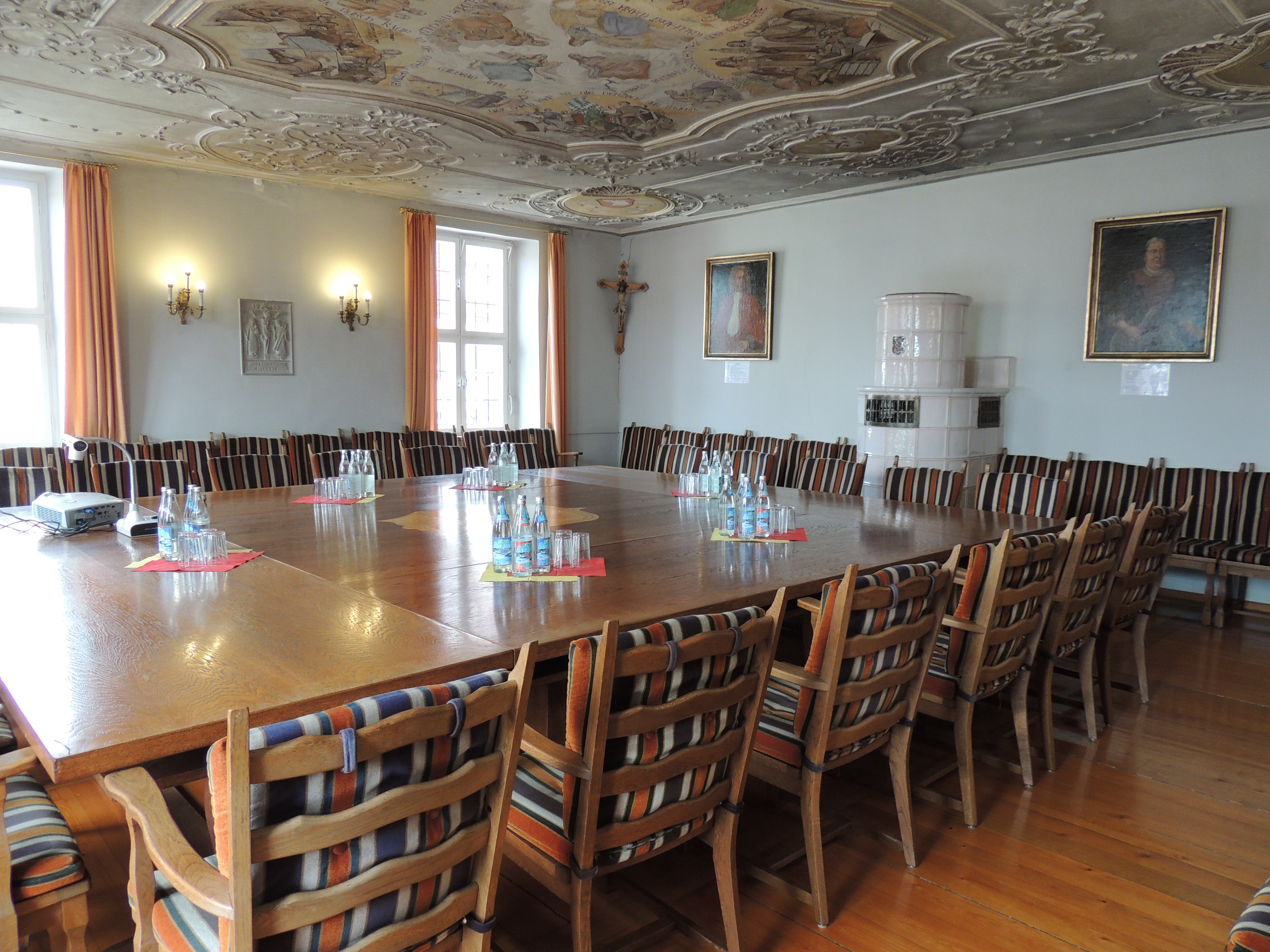 Historisches Rathaus mit Sitzungssaal des Stadtrates